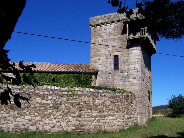 Vista parcial das Torres de Mens